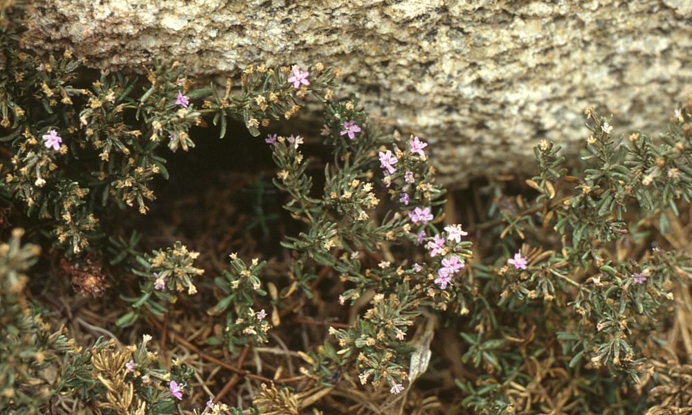 Frankenia salina, Frankeniengewächse (Frankeniaceae) - Chile, N Viña del Mar, Küstenfelsen/rocas costeras/coastal rocks